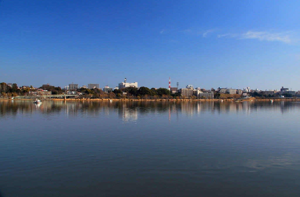 茨城県水戸市千波湖